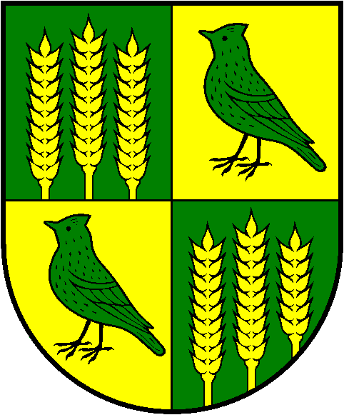 Keturvalakių herbas